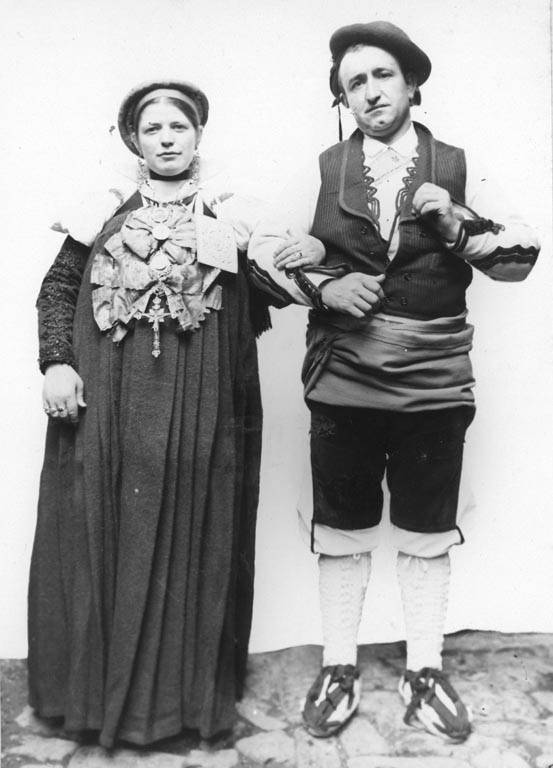 Matrimoni ric vestits de casament. Juli Soler i Santaló (Entre 1890 i 1914)